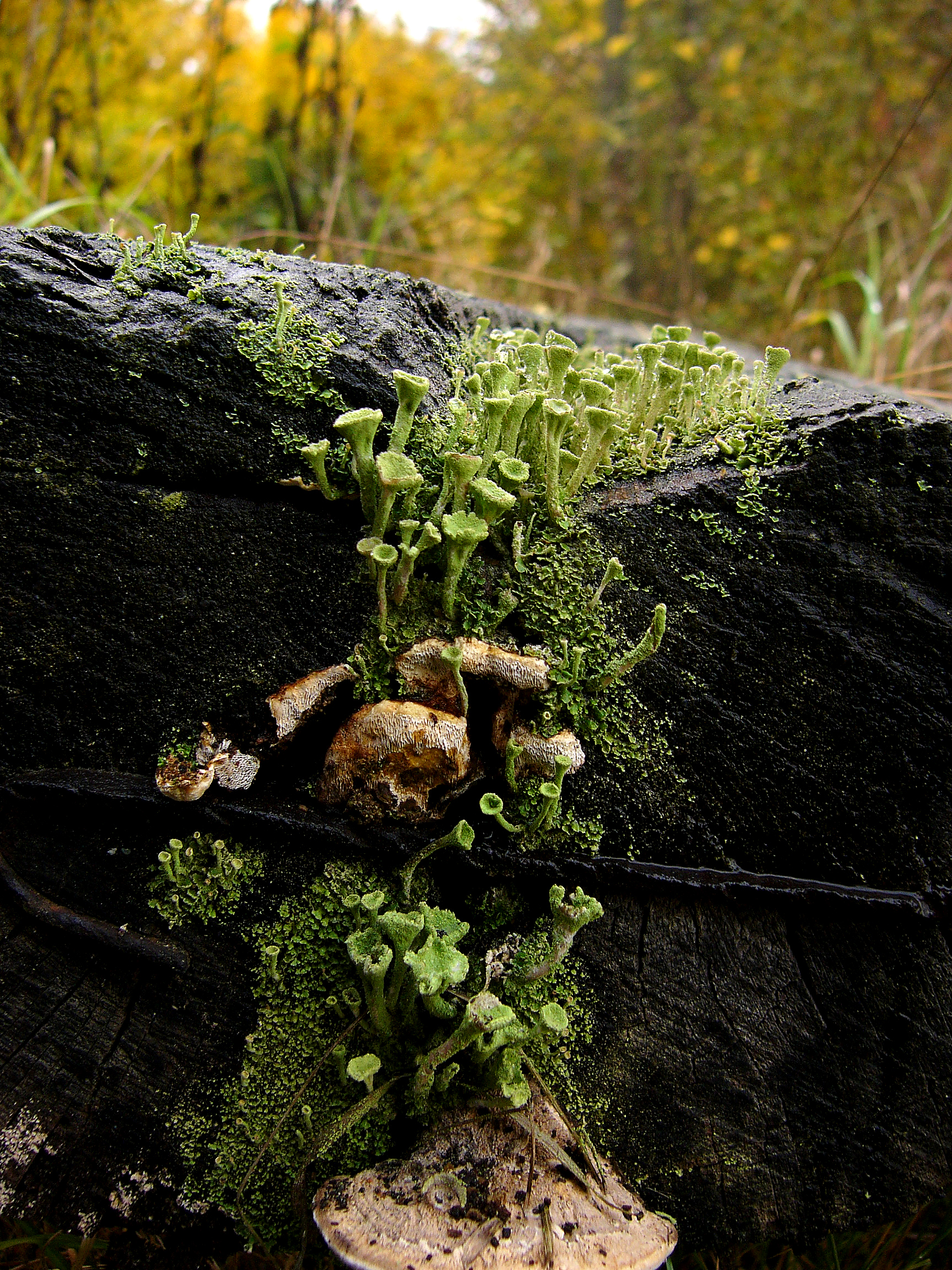 Cladonia